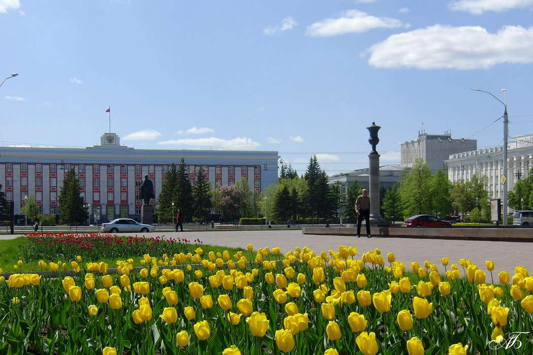 Площадь Советов в городе Барнаул. Здание администрации Алтайского края, памятник Ленину и Нулевой километр